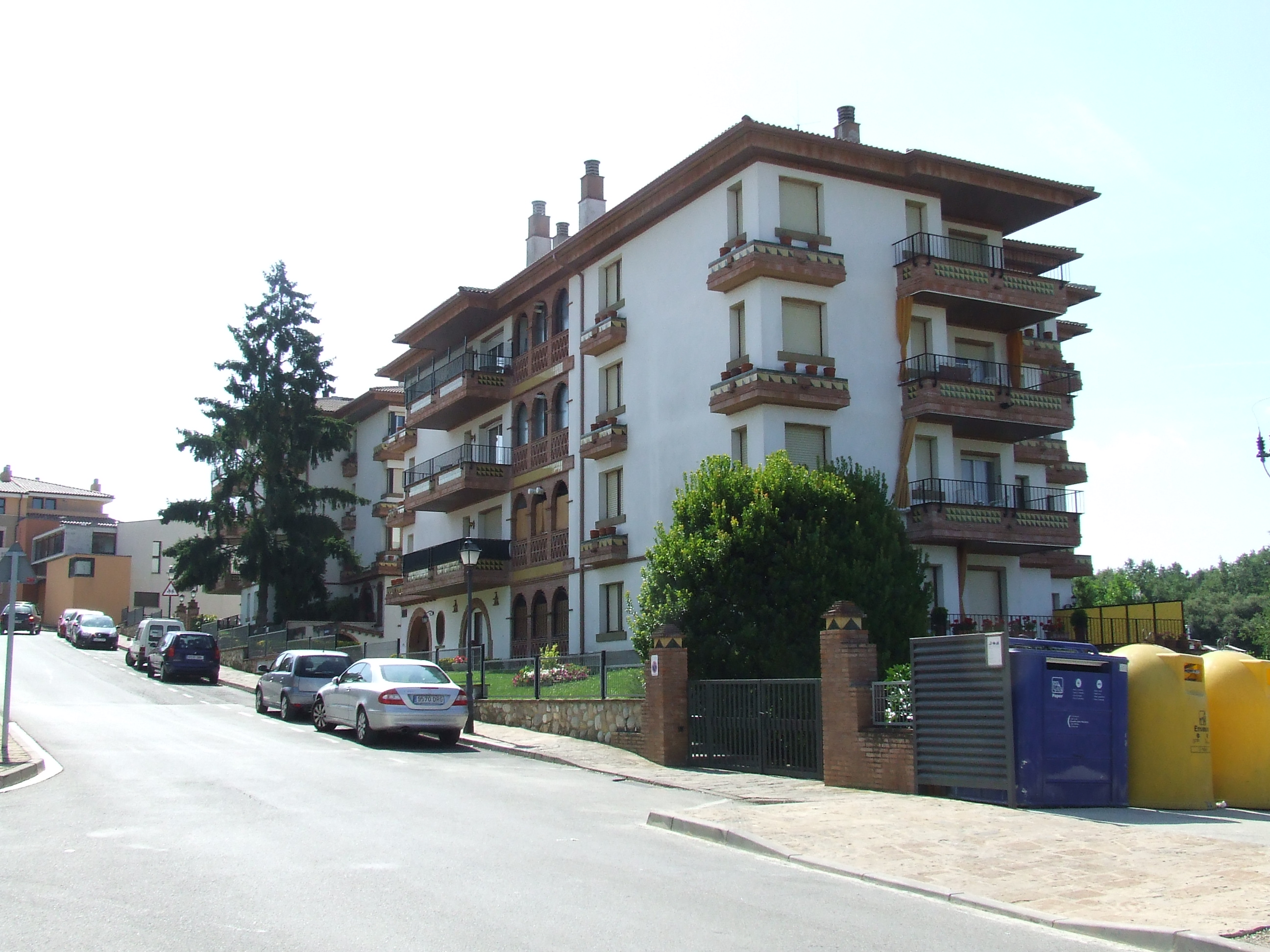 Pisos nous a Castellcir (Moianès)